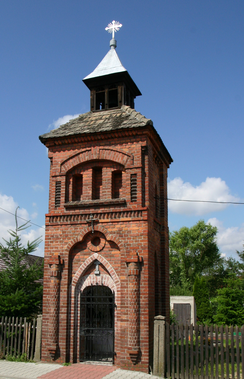 Smolarnia (dodatkowa nazwa w j. niem. Pechhütte) – wieś w Polsce położona w województwie opolskim, w powiecie krapkowickim, w gminie Strzeleczki.